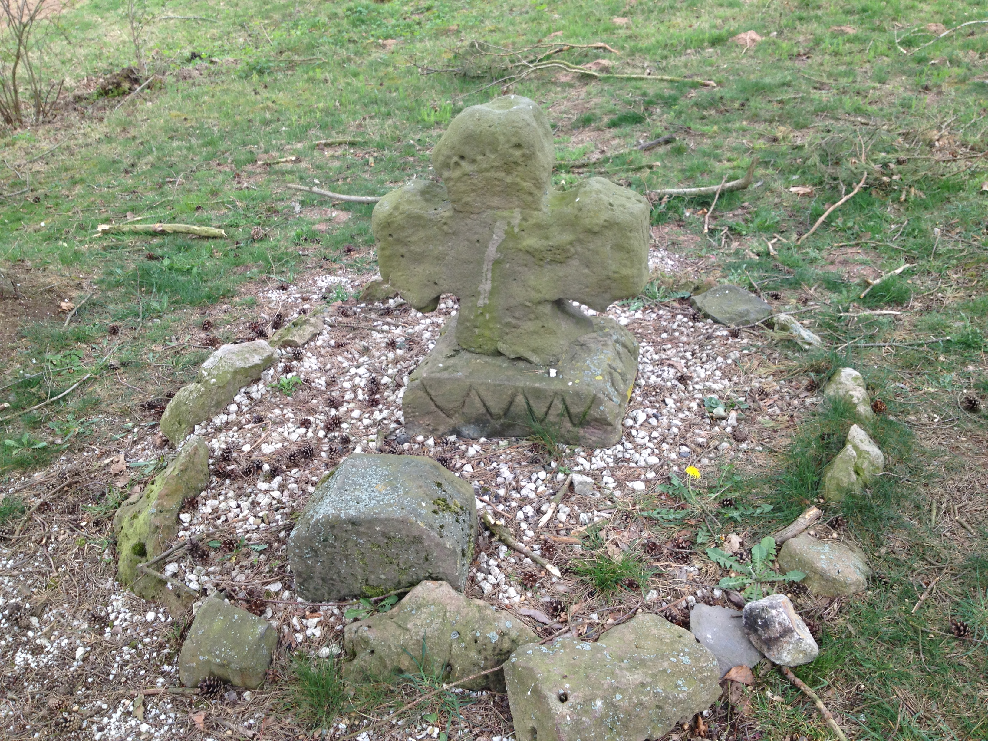 Das Schwedenkreuz bei Quentel; Grimmsteig